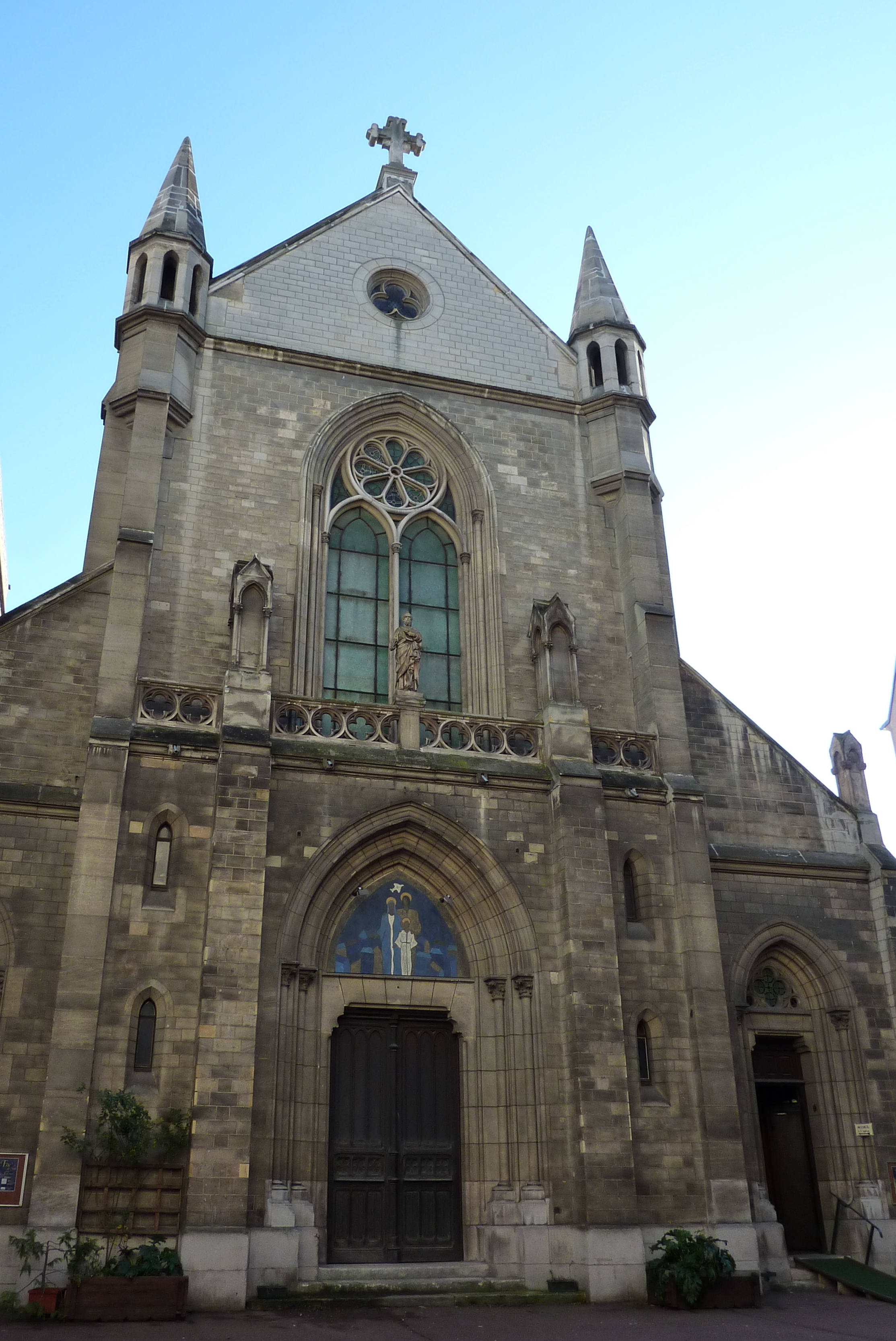 Eingangsfassade der Kirche Saint-Joseph-Artisan in Paris